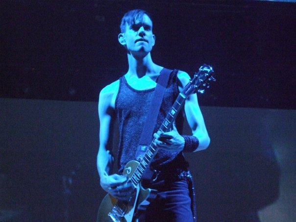 Stefan Olsdal lors du concert de Lyon le 7/11/2009, Halle Tony Garnier